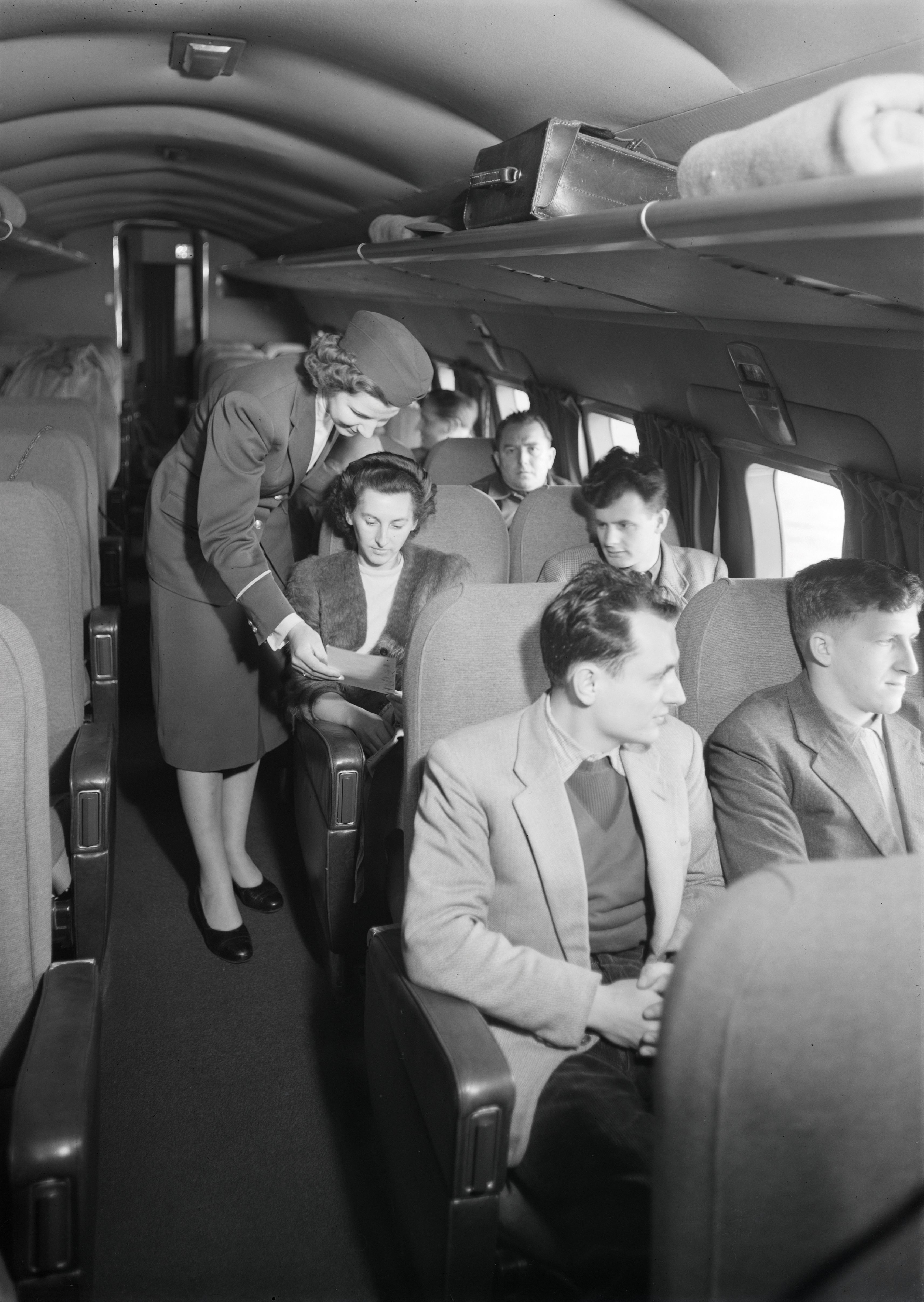 Hostess beim Bordservice in einer Convair CV-240